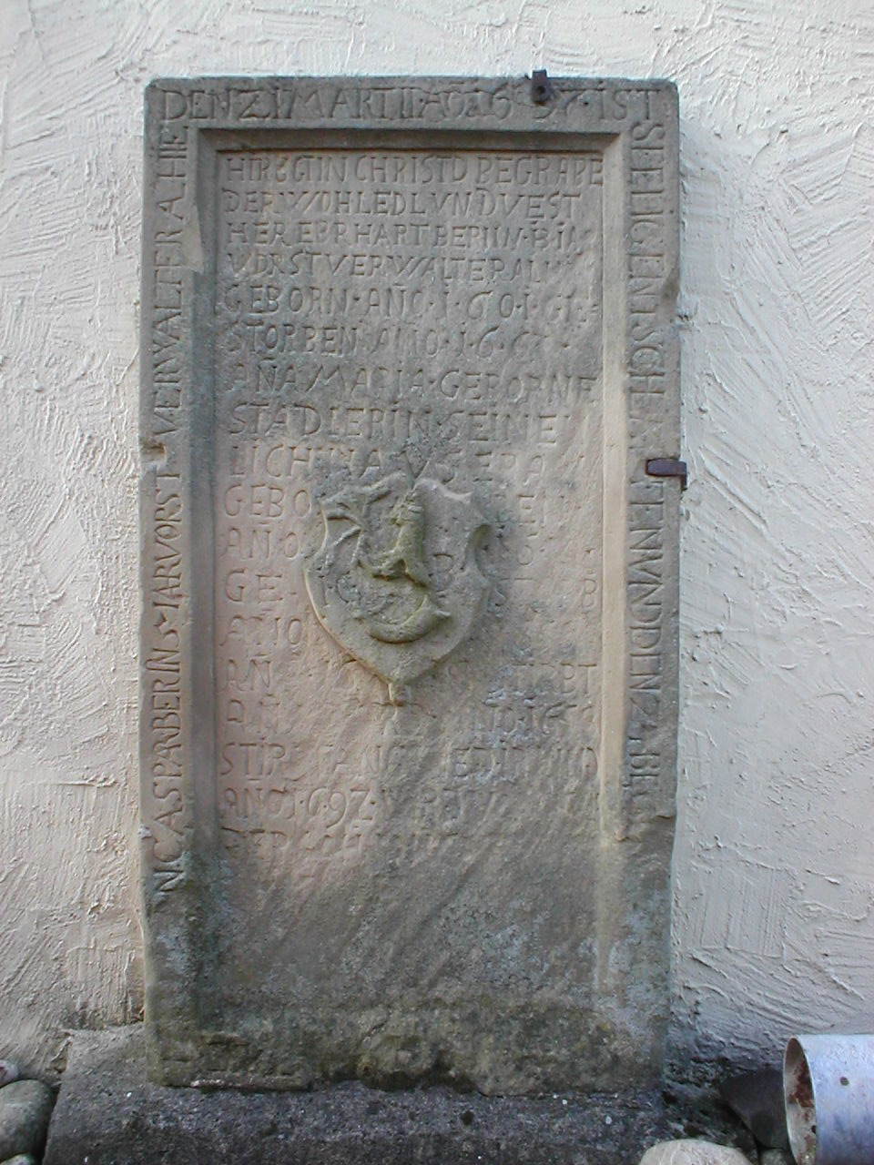 Epitaph für Eberhard Berlin (1601-1666), herzogl. württ. Forstmeister zu Neuenstadt am Kocher an der evang. Kirche in Kochersteinsfeld